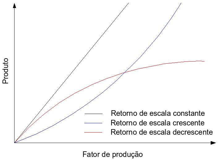 Ilustra os conceitos de Retornos Constantes, Crescentes e Decrescentes de escala.